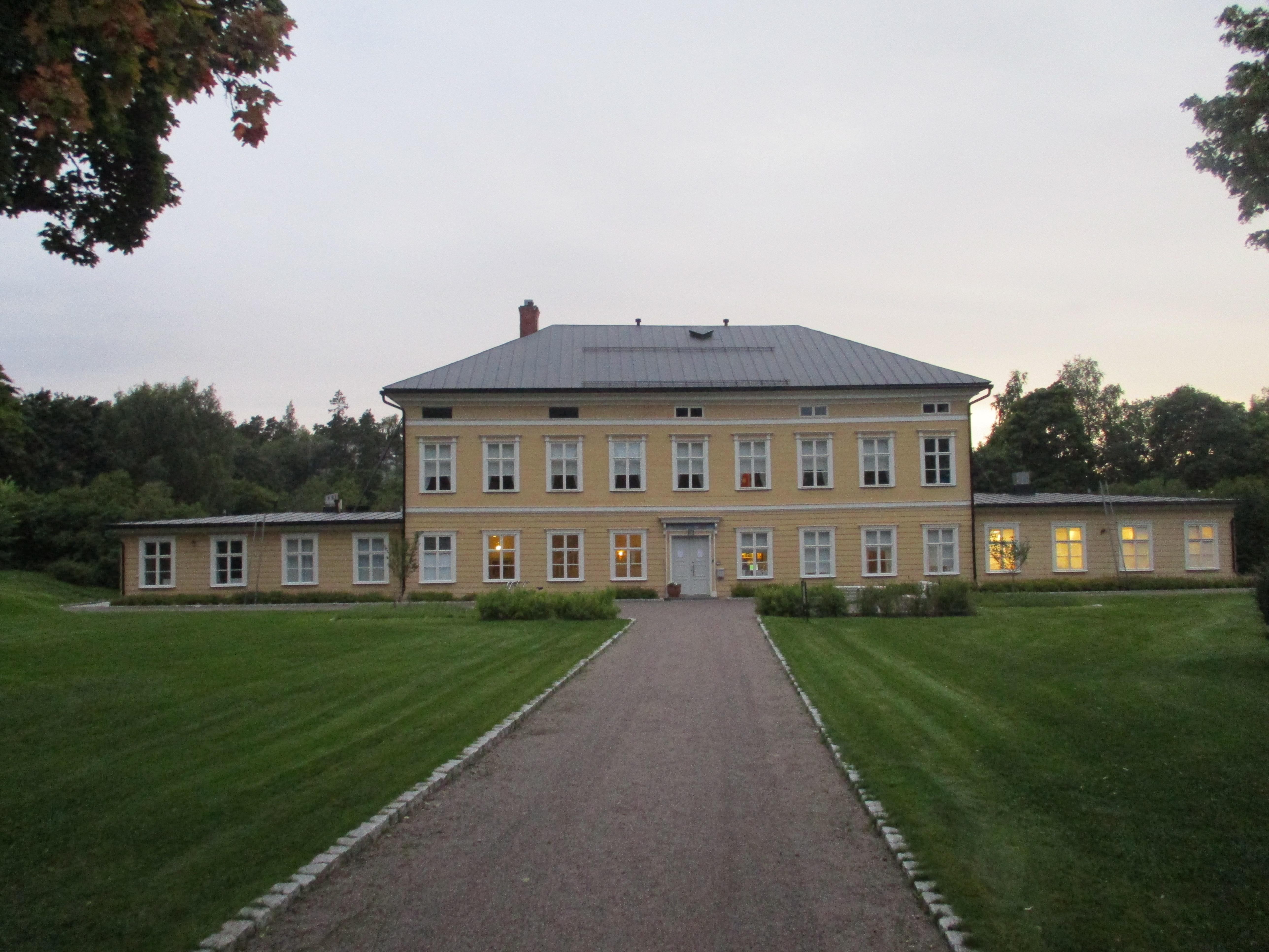 Kauttuan ruukinpuisto